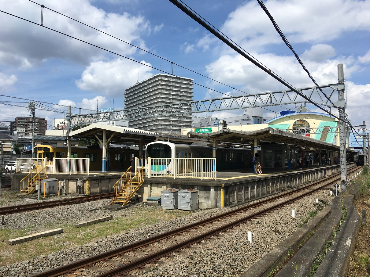 本川越方より撮影